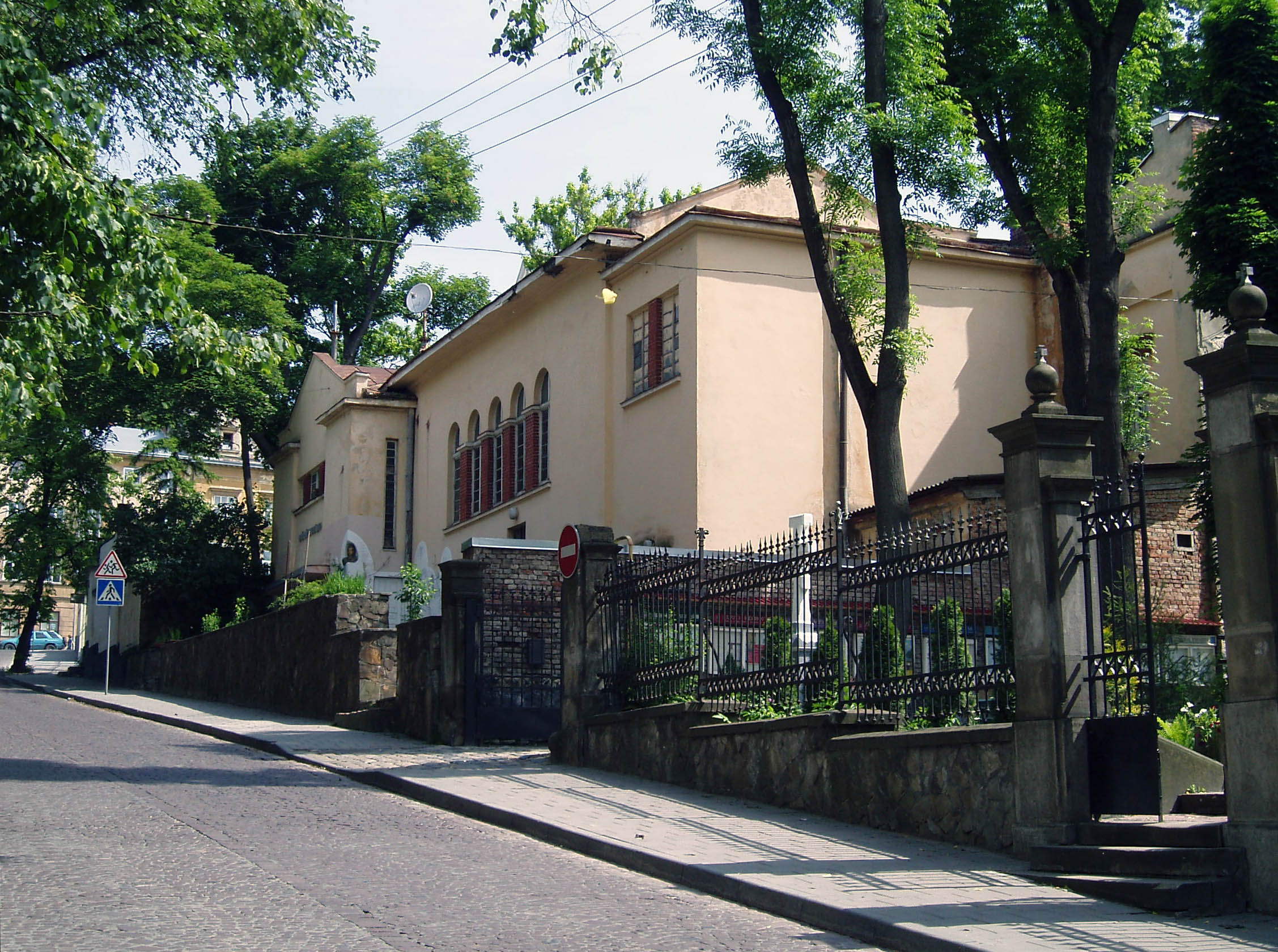 Колишній кінотеатр францисканців «Пакс» у Львові на вулиці Короленка, 1а. Потім Російський культурний центр (до травня 2017 року).